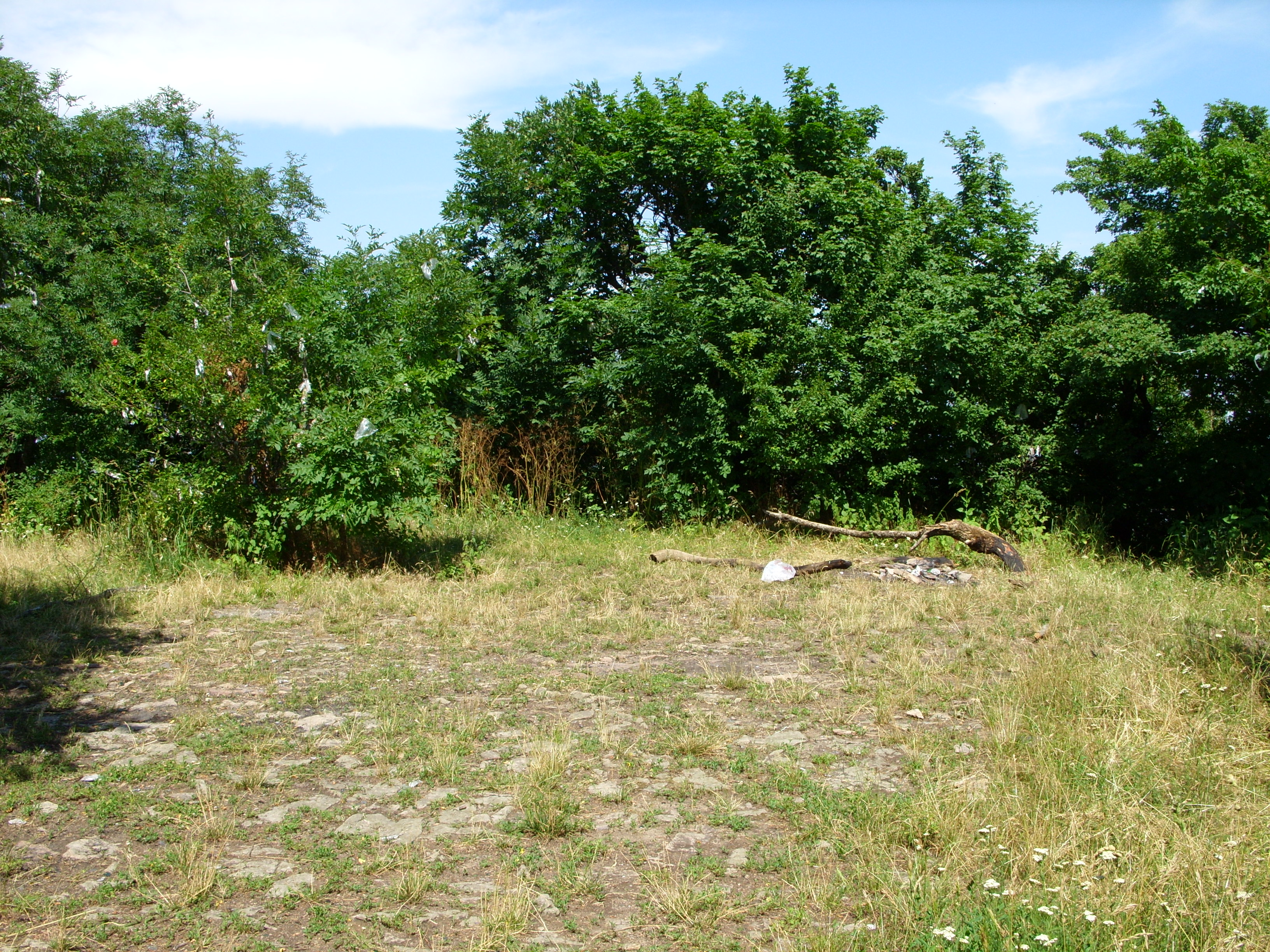 снимок июля 2009 г.